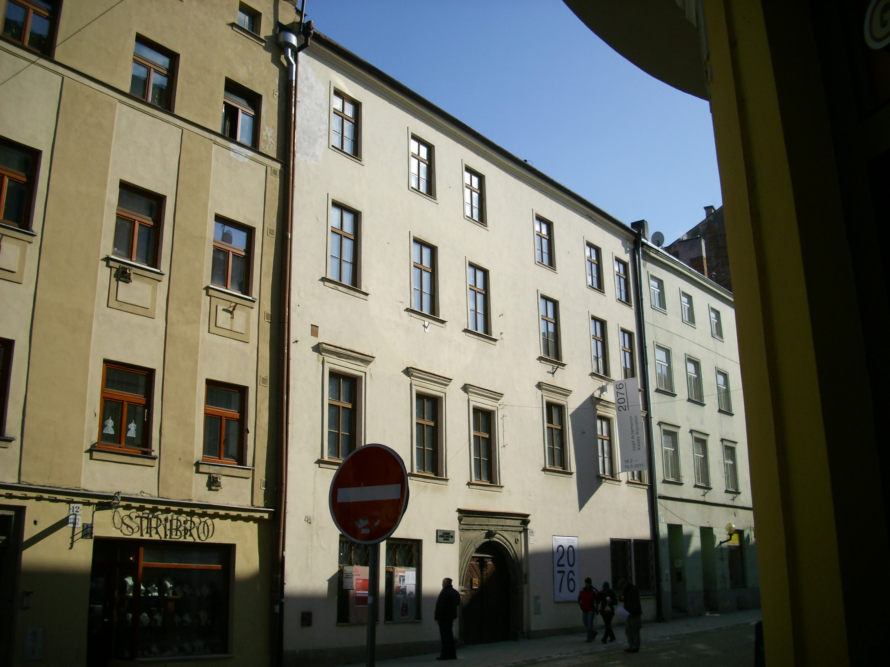 Měšťanský dům (Jihlava), Komenského 1333/10, Jihlava